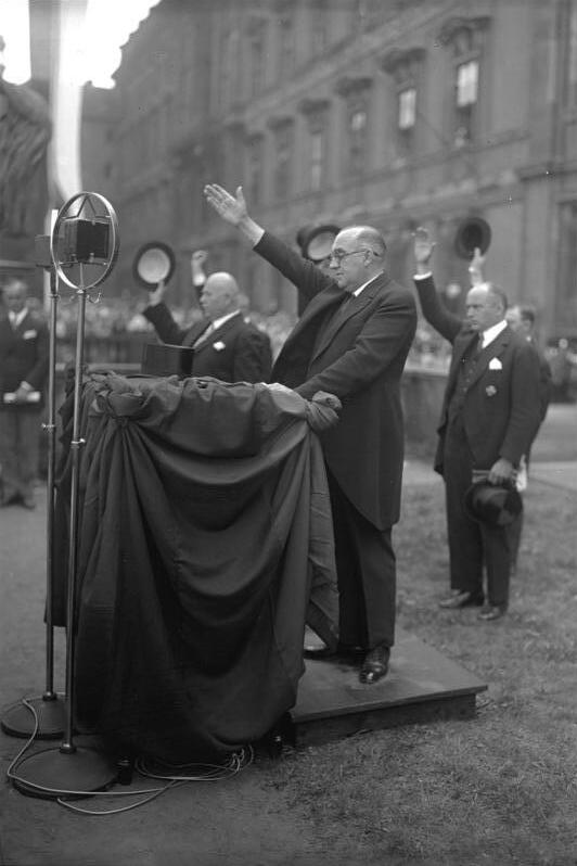 Verfassungsfeier der Berliner Schutzpolizei! Der preussische Innenminister Grzesinski bringt am Schluss der Ansprache an die Polizisten ein Hoch auf das Vaterland aus.